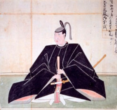 山内豊敷の肖像。